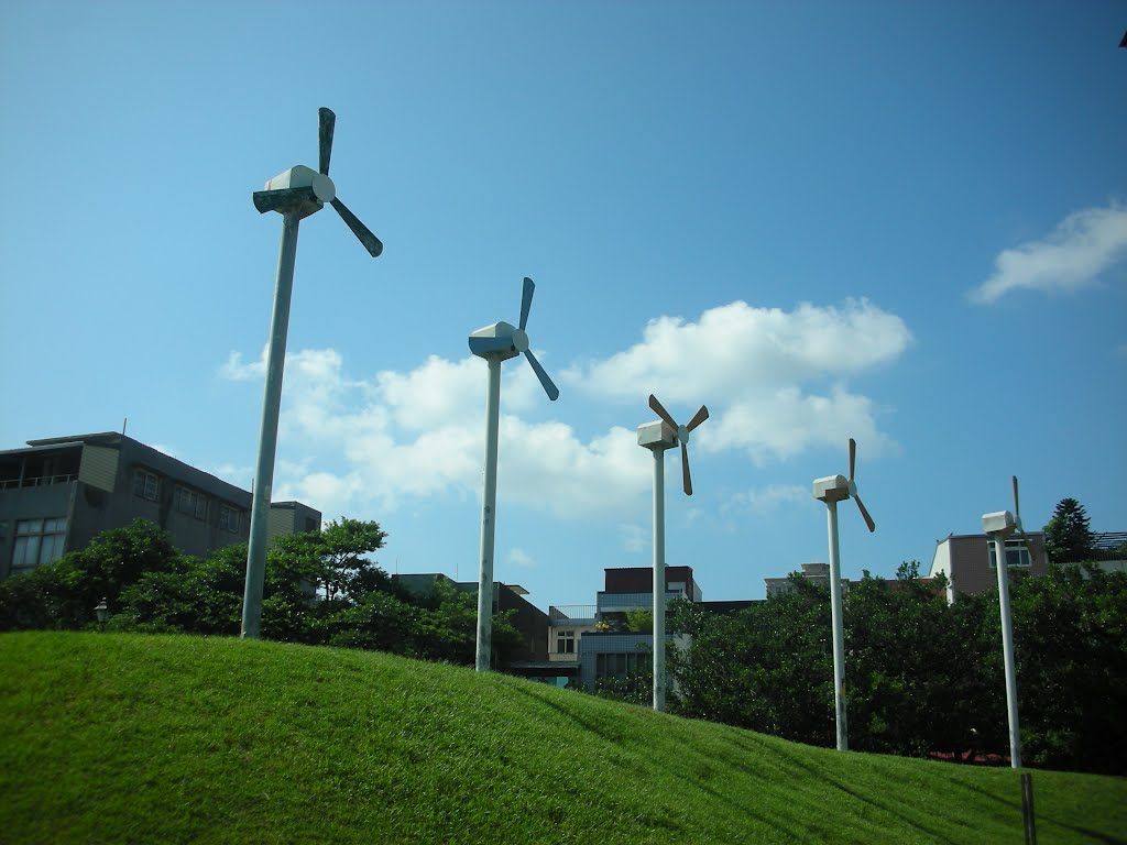 桃園市文昌公園。